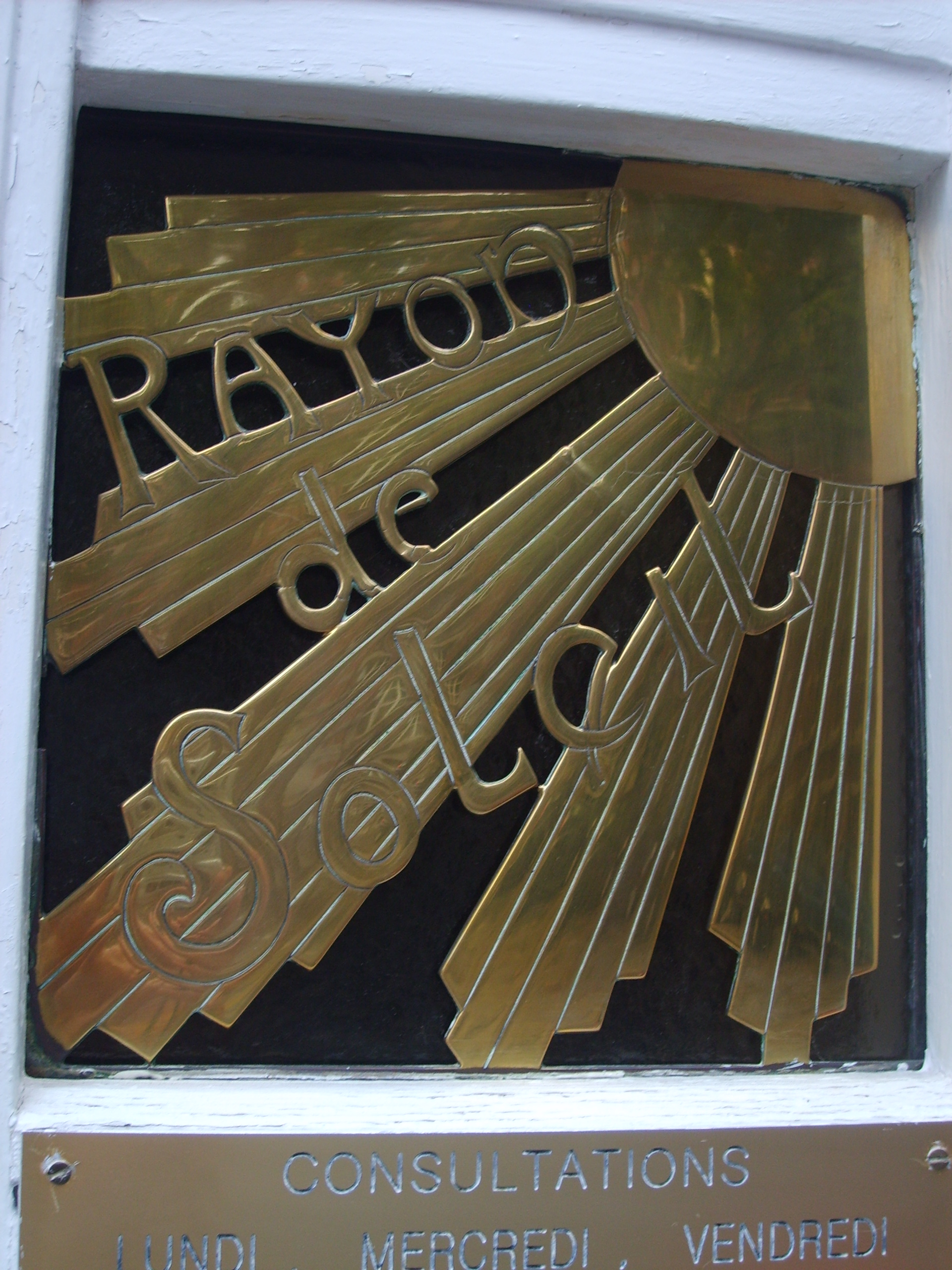 Maison "Rayon de Soleil" (1908), Place des Ecoles n° 23, Spa